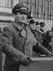 Breslau, Gauleiter Karl Hanke bei Ansprache Breslau Februar 1945 Die ersten Bilder aus der Festung Breslau. Neue Volkssturm-Bataillone der Gauhauptstadt werden vom Gauleiter Hanke vereidigt. In den nächsten Stunden bereits werden diese seit Wochen ausgebildeten Männer zu ihren Kameraden treten, die die Verteidigung der Heimatstadt übernommen haben. Gauleiter Hanke bei seiner Ansprache. SS-PK Mitschke [Breslau.- Gauleiter Karl Hanke bei Ansprache am Rednerpult mit Hakenkreuz-Flagge und Stahlhelm] Abgebildete Personen: Hanke, Karl: Staatssekretär, Gauleiter und Oberpräsident von Niederschlesien, Deutschland (GND 130339490) Information added by Wikimedia users.